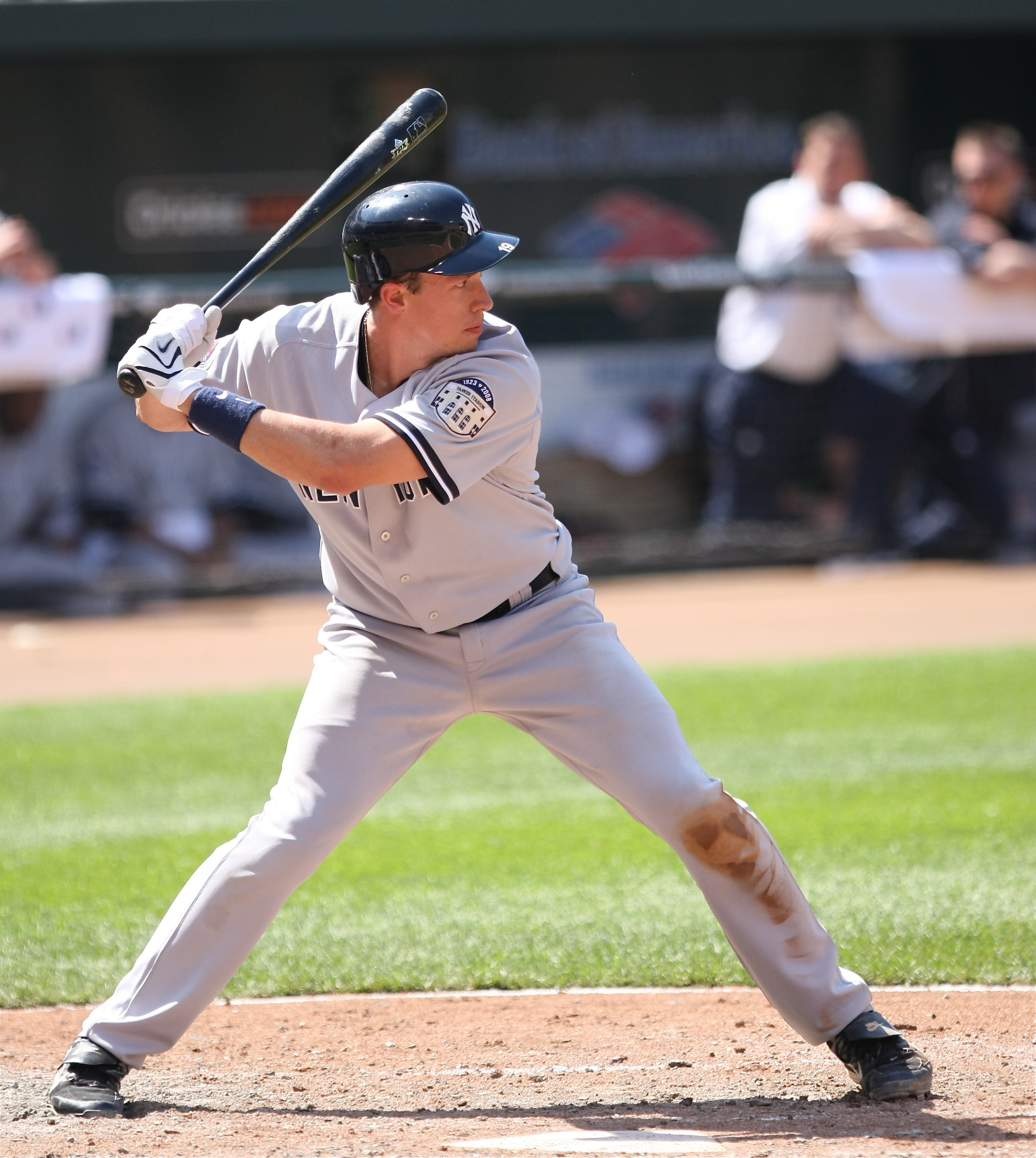 Chad Moeller